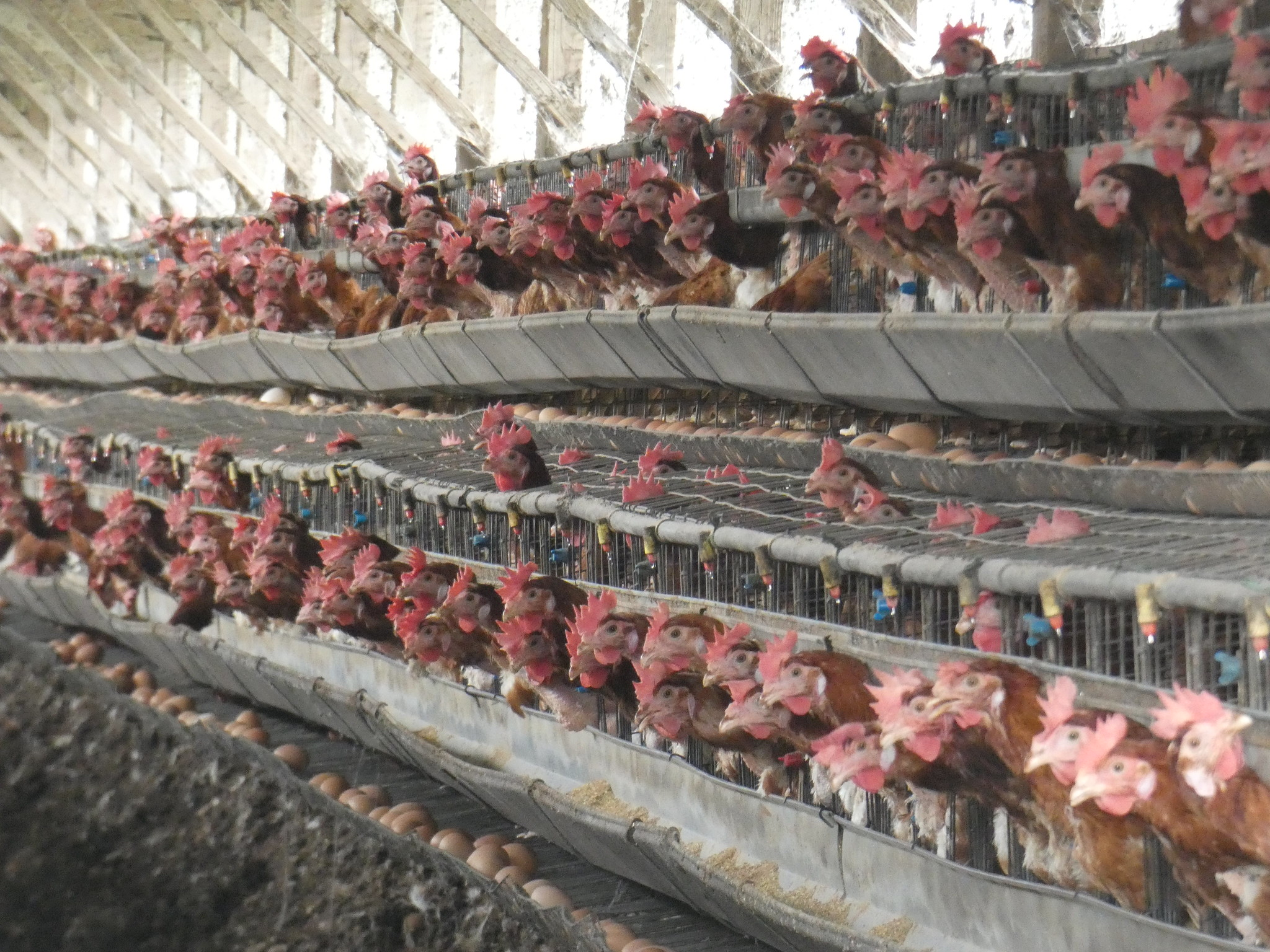 日本ではケージ飼育が主流 一羽当たりＢ４程度のスペースで飼育される